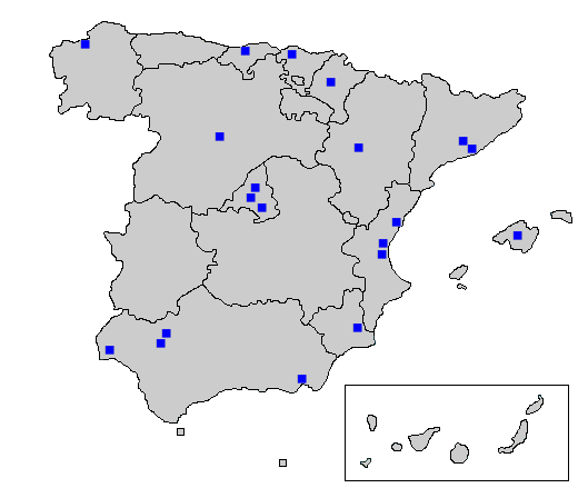 Mapa basado en Image:Comunitats Autònomes.png; el cual está sujeto a una licencia GDLF. Editado para mostrar las localidades de los equipos de futbol español de la temporada 2007-08